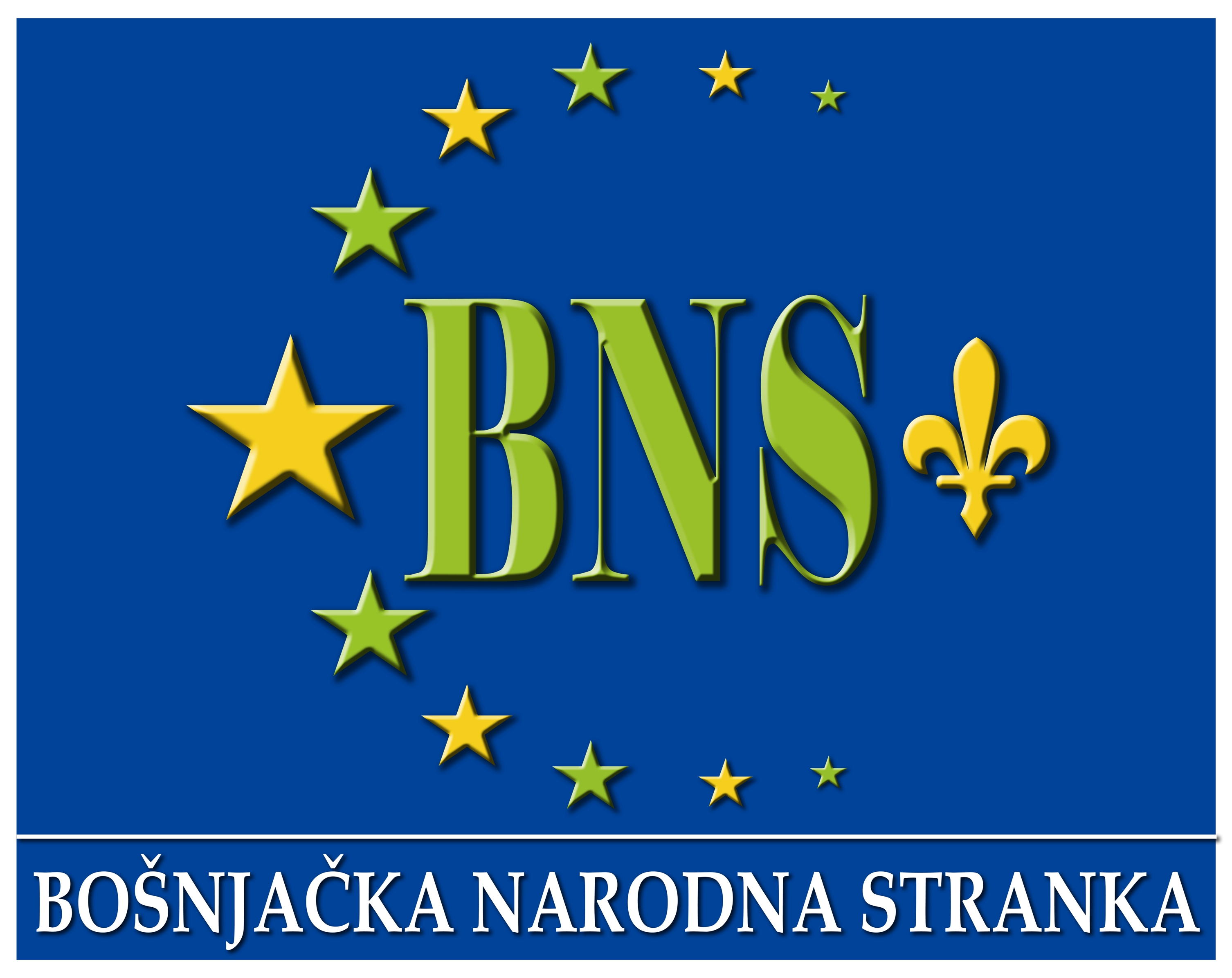 Bošnjačka narodna stranka